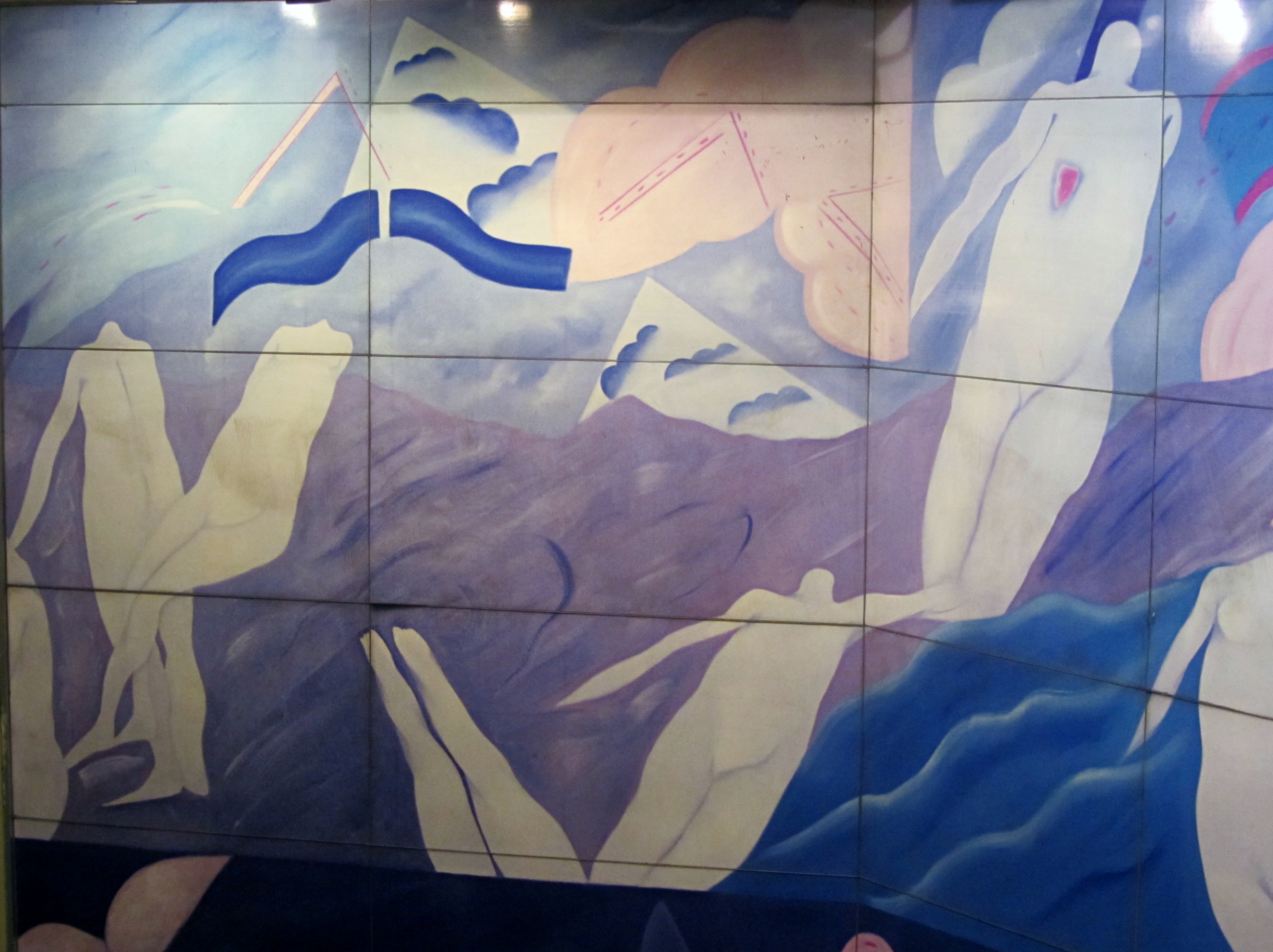 Imágenes de barrio, de Rodolfo Opazo, 2006, metro El Golf, Santiago de Chile